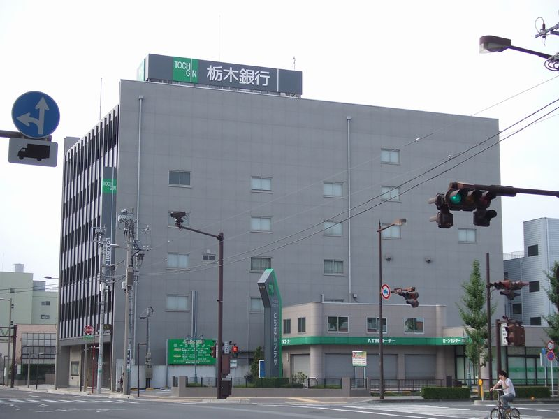 栃木銀行本店営業部